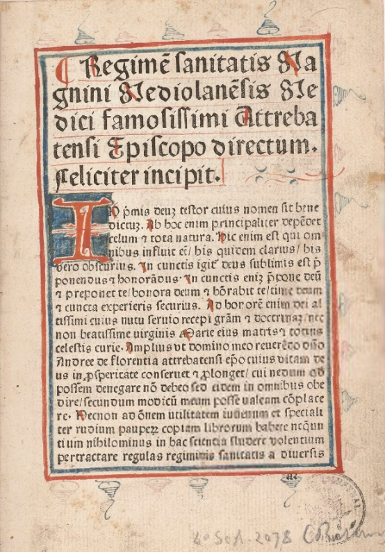 Magninus Mediolanensis, Regimen sanitatis, Louvain 1482, title page